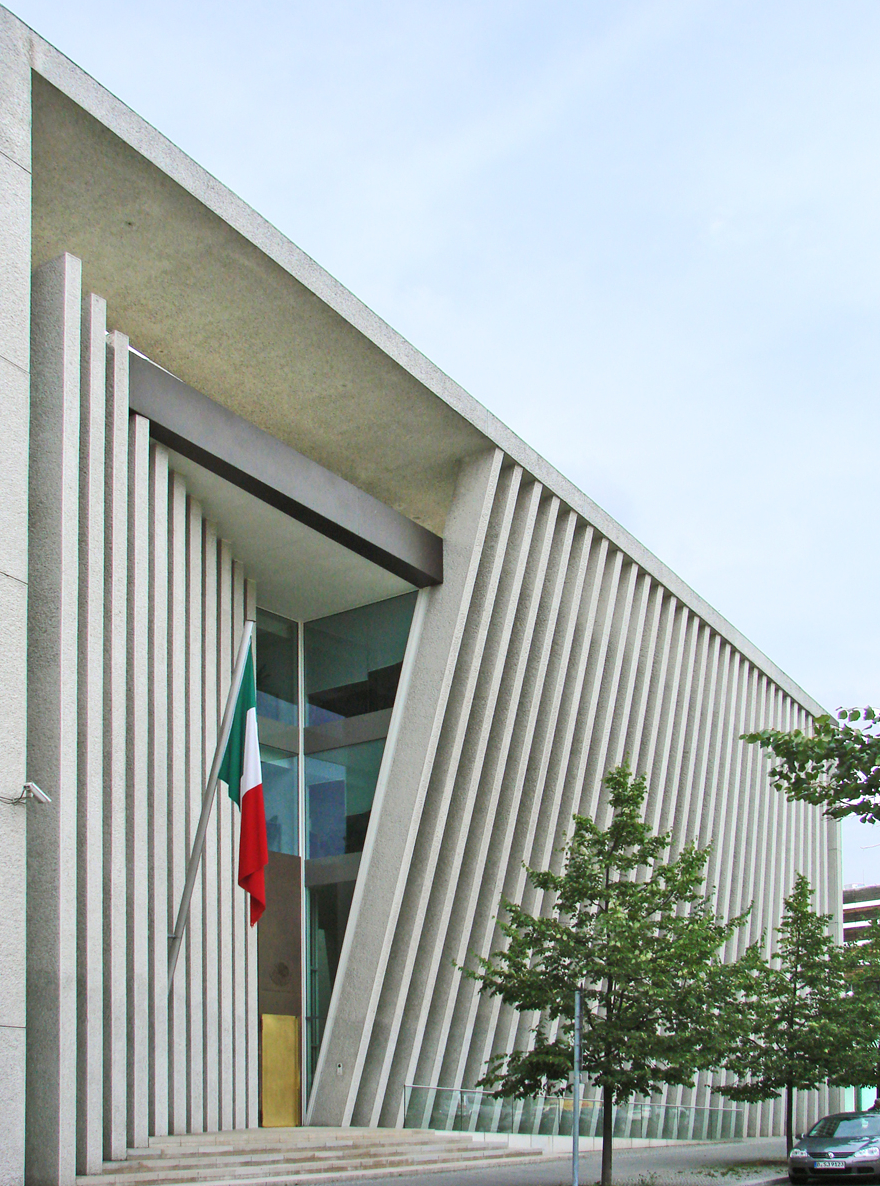 La façade principale de l'Ambassade du Mexique Les façades de l'Ambassade du Mexique, hautes de 18 m, sont constituées de fines barres de béton incluant des morceaux de marbre. Les architectes sont Teodore Gonzalez de Leon et J. Francisco Serrano, de Mexico. Le bâtiment a été construit entre 1999 et 2000. Site MIMOA